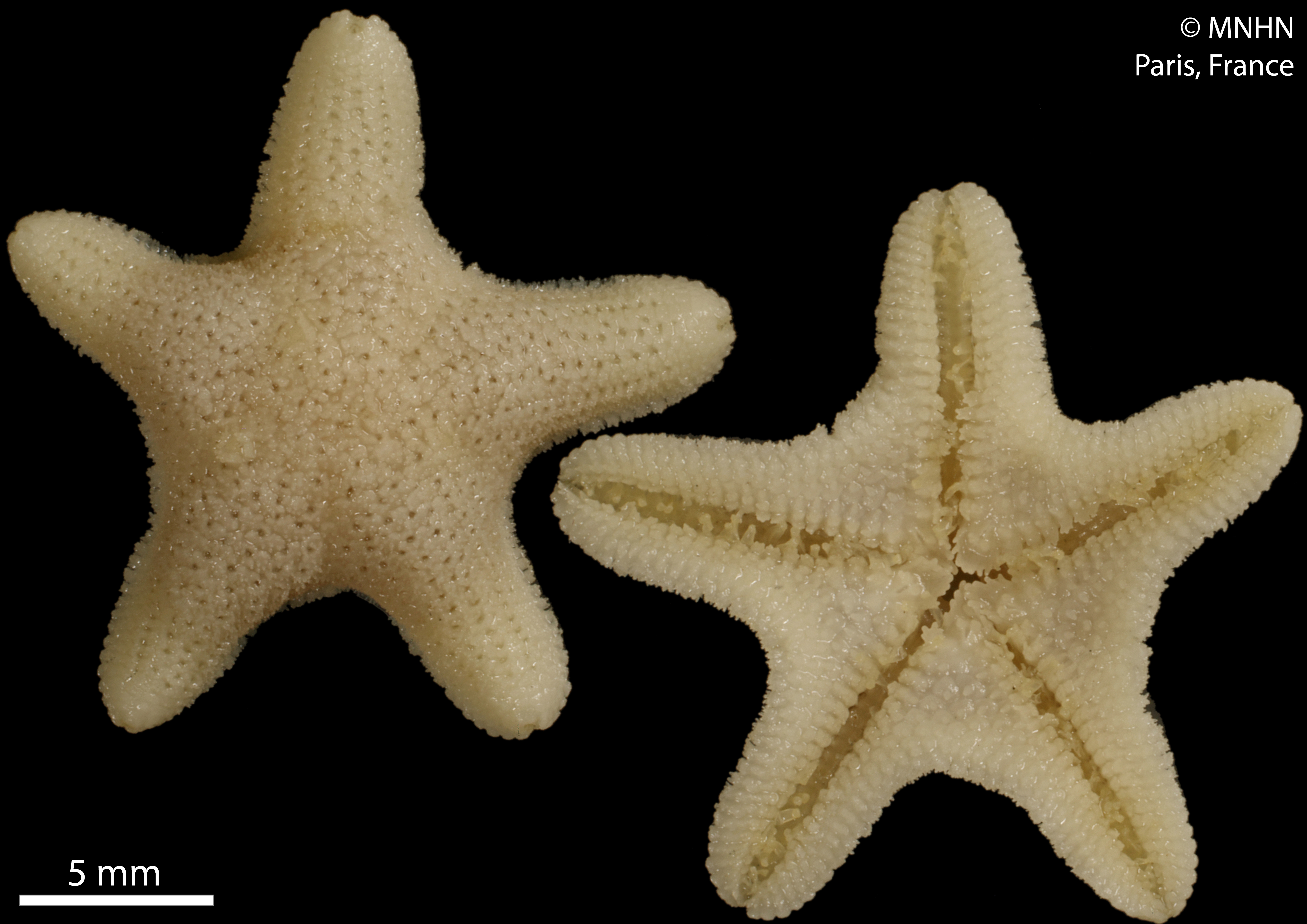 Aquilonastra conandae - (holotype)Spécimen MNHN-IE-2013-2489Collection : Échinodermes (IE)Muséum National d'Histoire Naturelle (Paris, France)